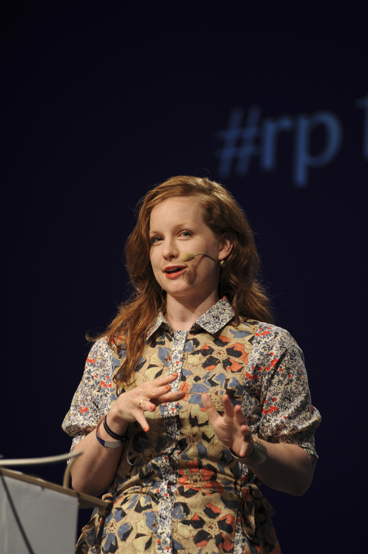 (cc) Tony Sojka I re:publica 2013